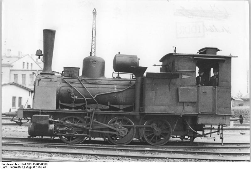 Dampflok Zentralbild Schmidtke Lokomotivtypen der Deutschen Reichsbahn. UBz: Werklokomotive